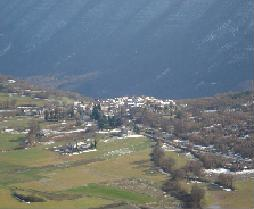 Il borgo medievale di Pedicciano